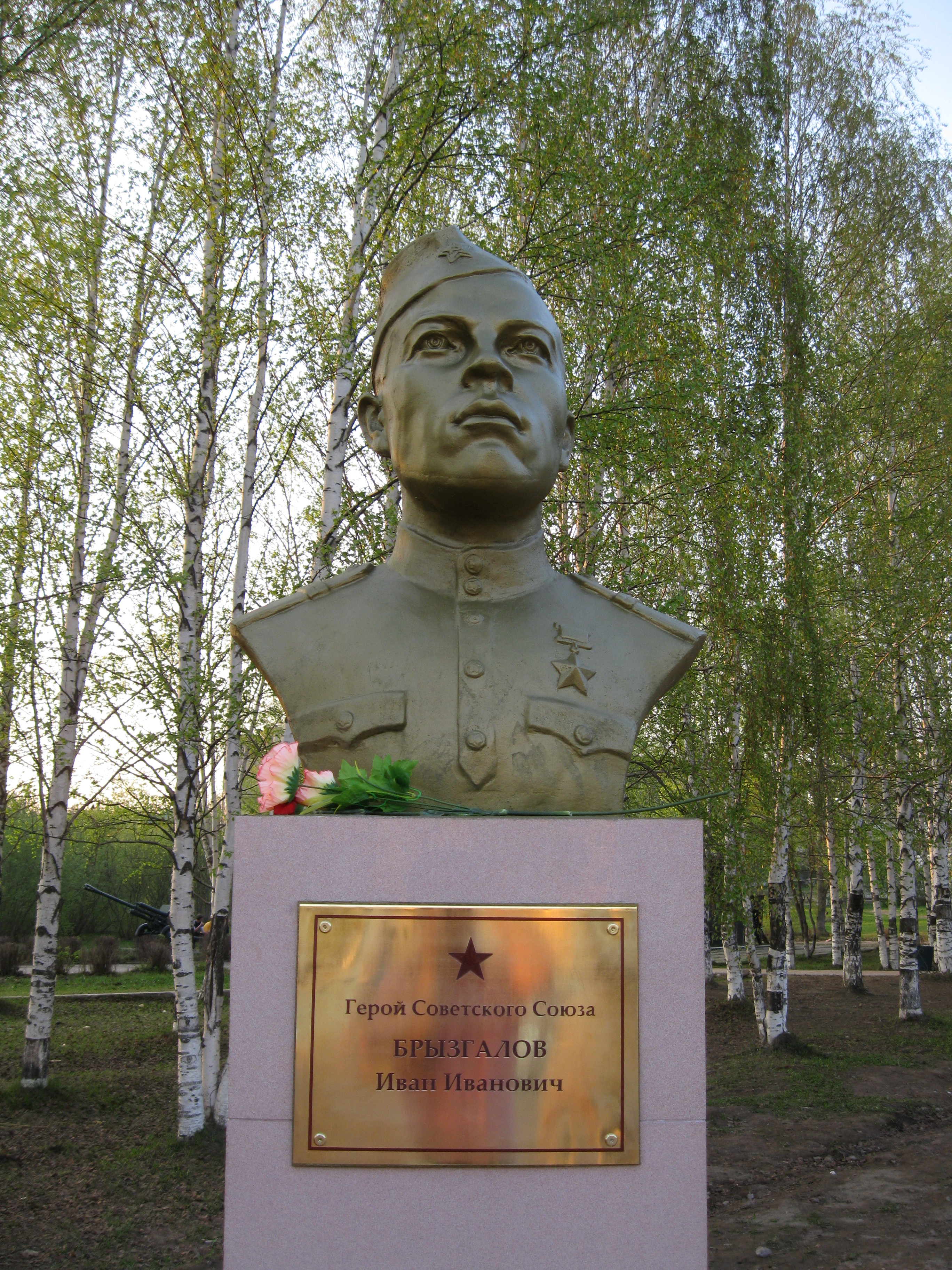 Бюст Ивана Ивановича Брызгалова на Аллее Славы, открытой 09.05.2010 года в городе Чернушка.